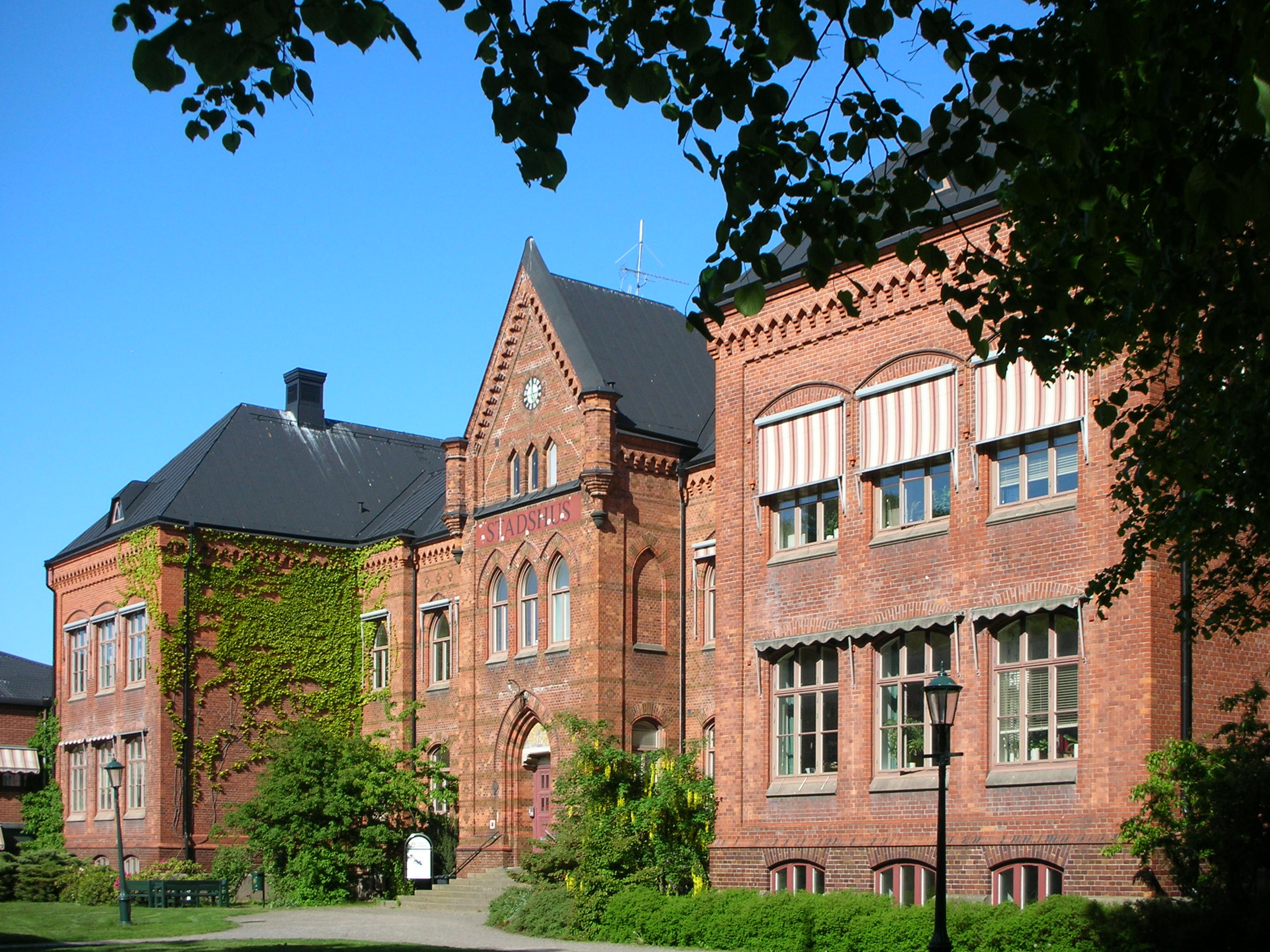 Varbergs stadshus